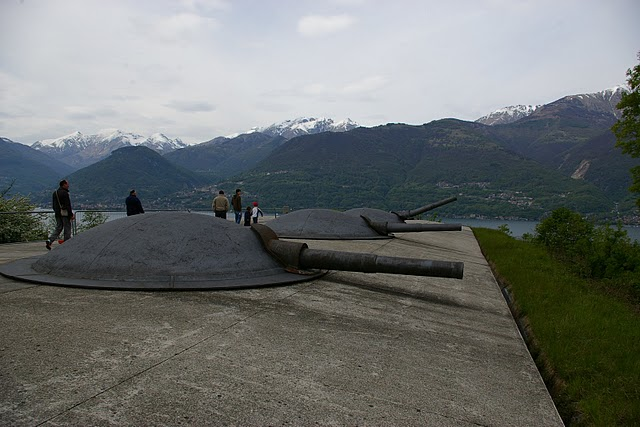 Utente:Riotforlife, foto personale